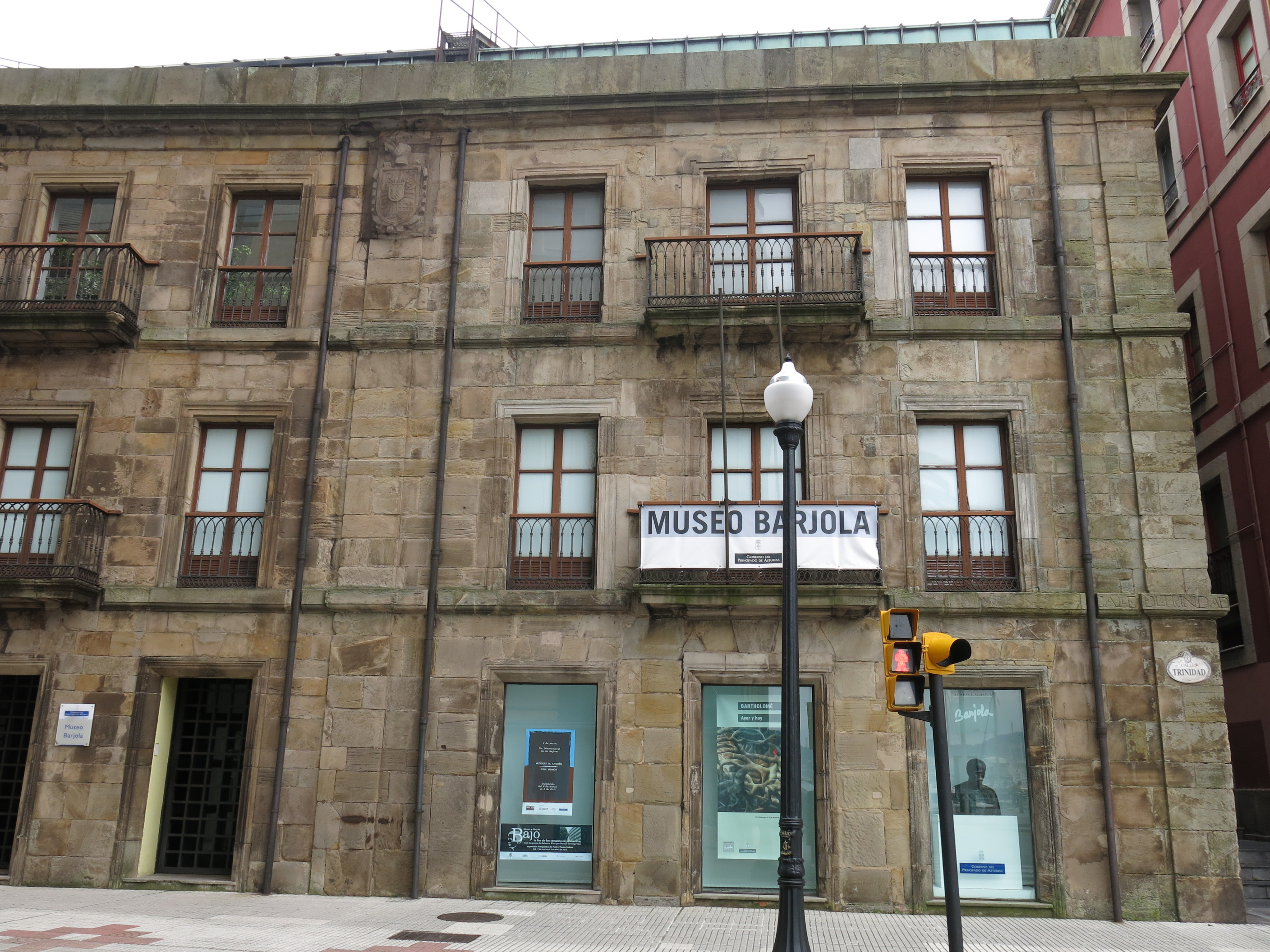 Palacio de Jove Huergo y Capilla de la Trinidad Museo Barjola